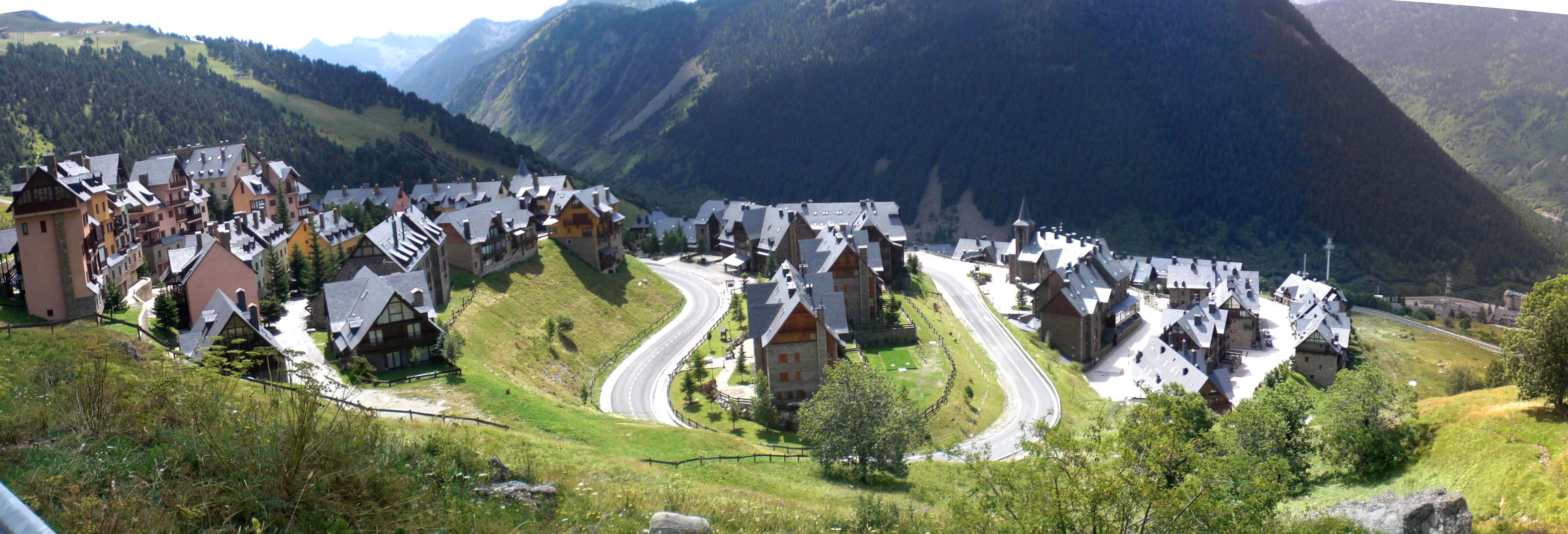 Cuestas de Rudako ikuspegia, Baqueira eta Pla de Beret artean.